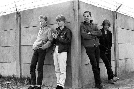 De Må Være Belgiere 1983. Foto: Flemming Møller